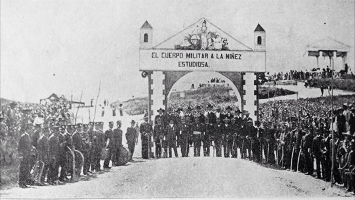 Fiestas minervalias celebradas en El Quiché por el general Fidel Echeverría Flores en Quiché. 1907